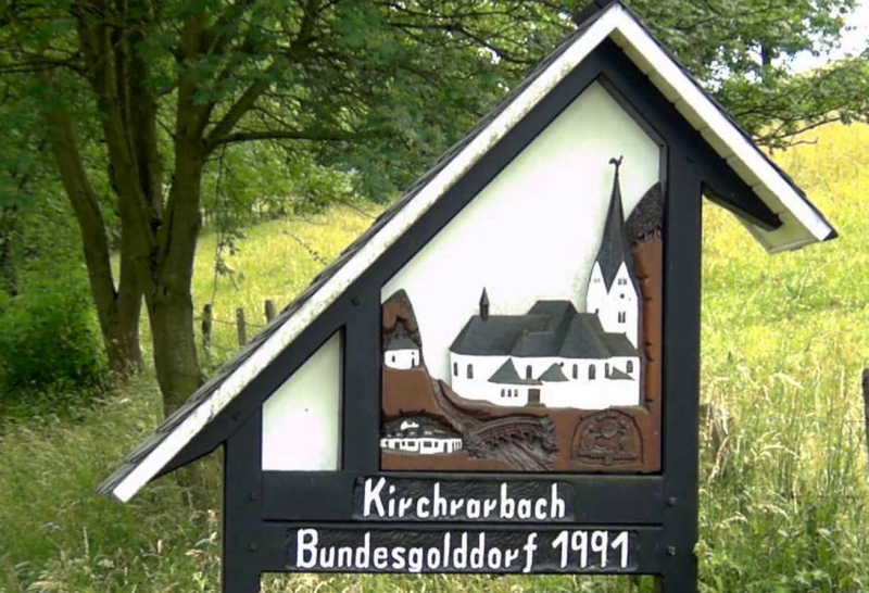 Kirchrarbach (Schmallenberg) Hinweistafel, Germany.